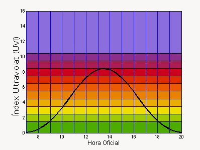 Gràfica de la distribució de l'Index de radiació Ultraviolada (UVI)